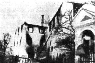 Pogled na požgane Dražgoše